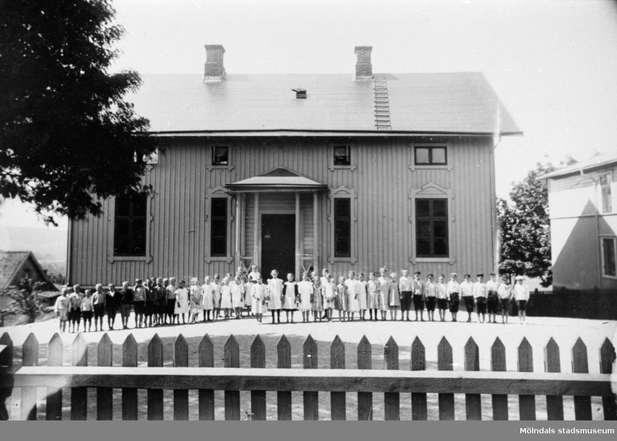 Ormås småskola i Mölndal. Skolbarn framför skolbyggnaden på skolgården.